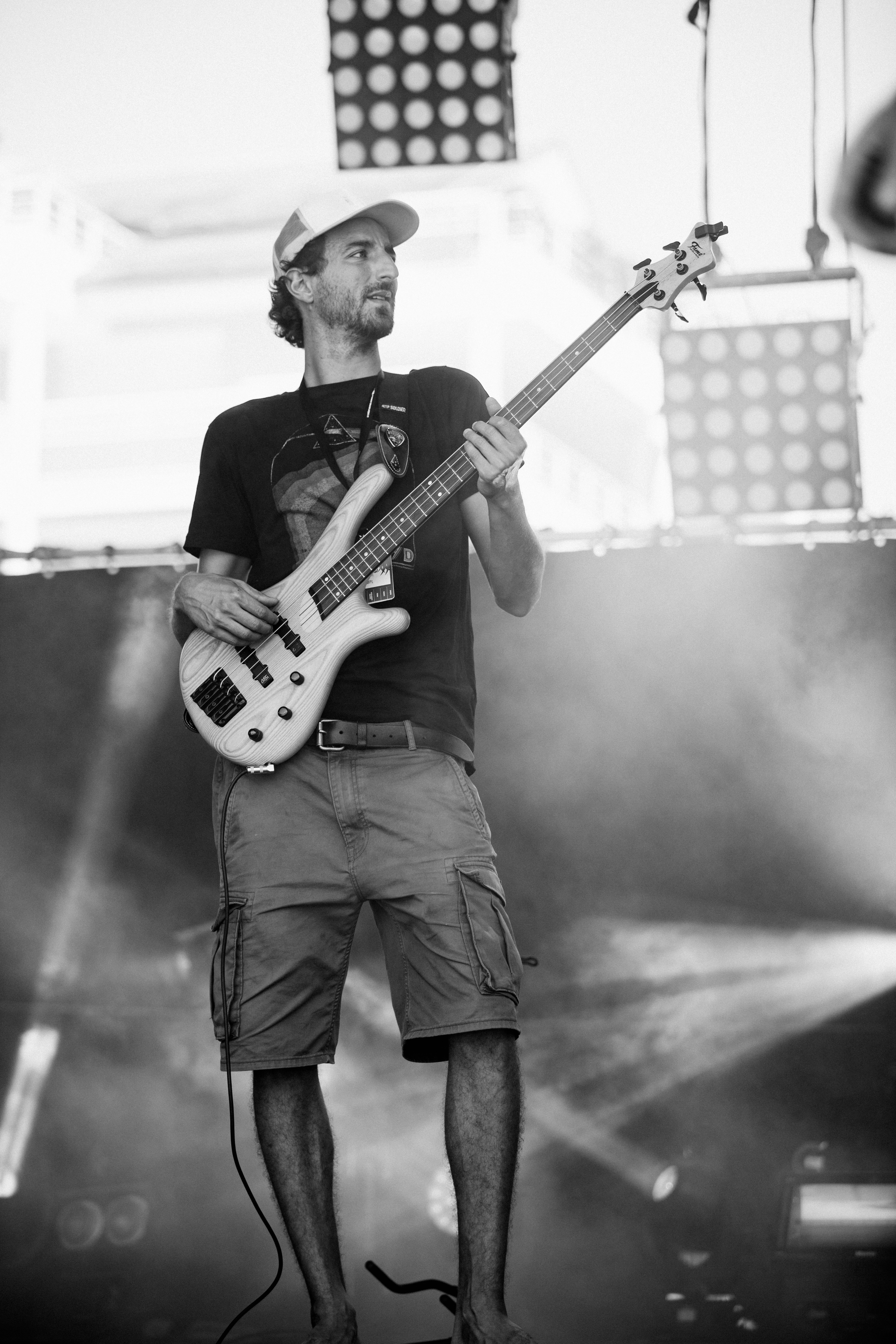 Marina Bincoletto